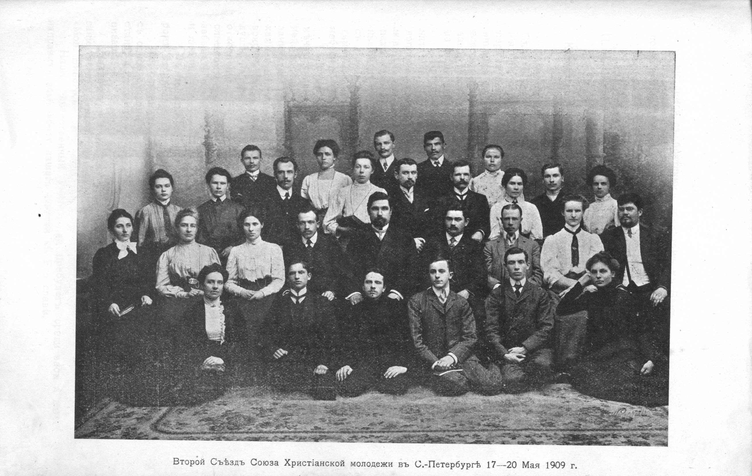 Второй съезд Союза христианской молодежи в Санкт-Петербурге, 1909 год. В центре И. С. Проханов.